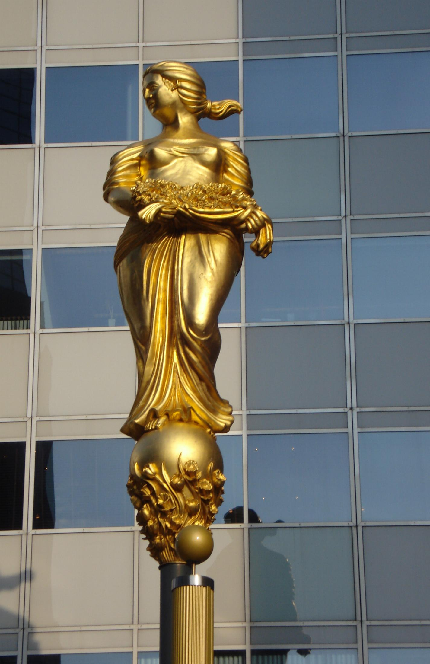 Rotterdam, Weena. Kunstwerk "Flora" van Theo Crosby. Rotterdam/The Netherlands.